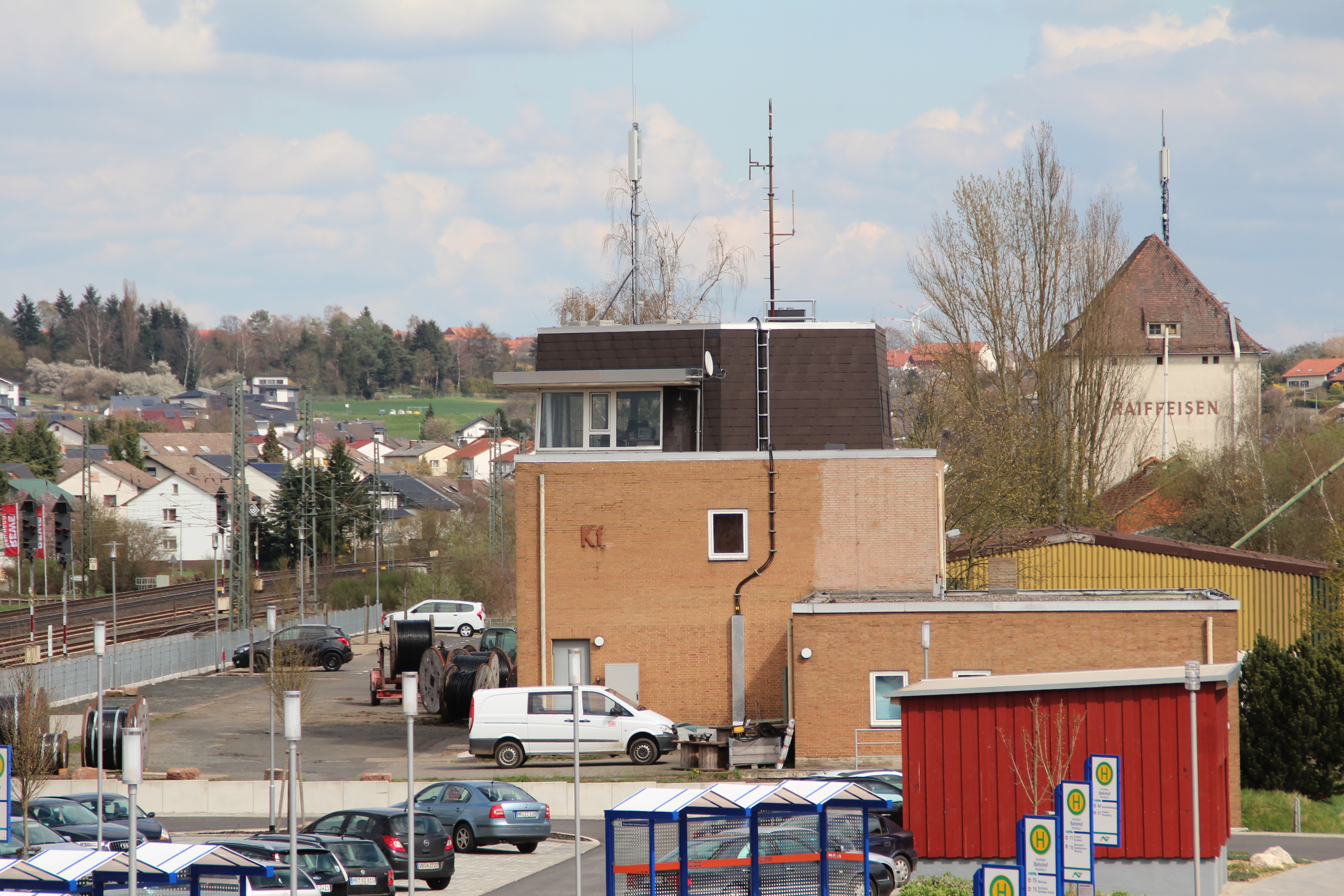 Relaisstellwerk Kf des Bahnhofs Kirchhain (Bz Kassel), nach den Rückbauten der Gleise abseits der Gleisanlagen, im Hintergrund das alte Raiffeisen-Lagerhaus, in älteren Gleisplänen als "Kornhaus" bezeichnet.